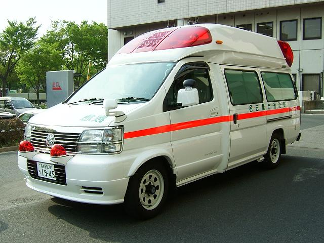 救急自動車（名古屋市中区の国立名古屋病院にて撮影）